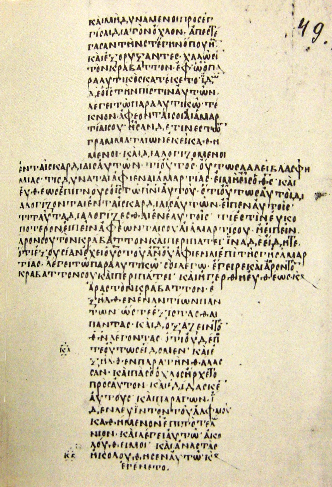 Codex 047 (Gregory-Aland), manuscript of the Greek New Testament, with the text from the Gospel of Mark 2:4-15